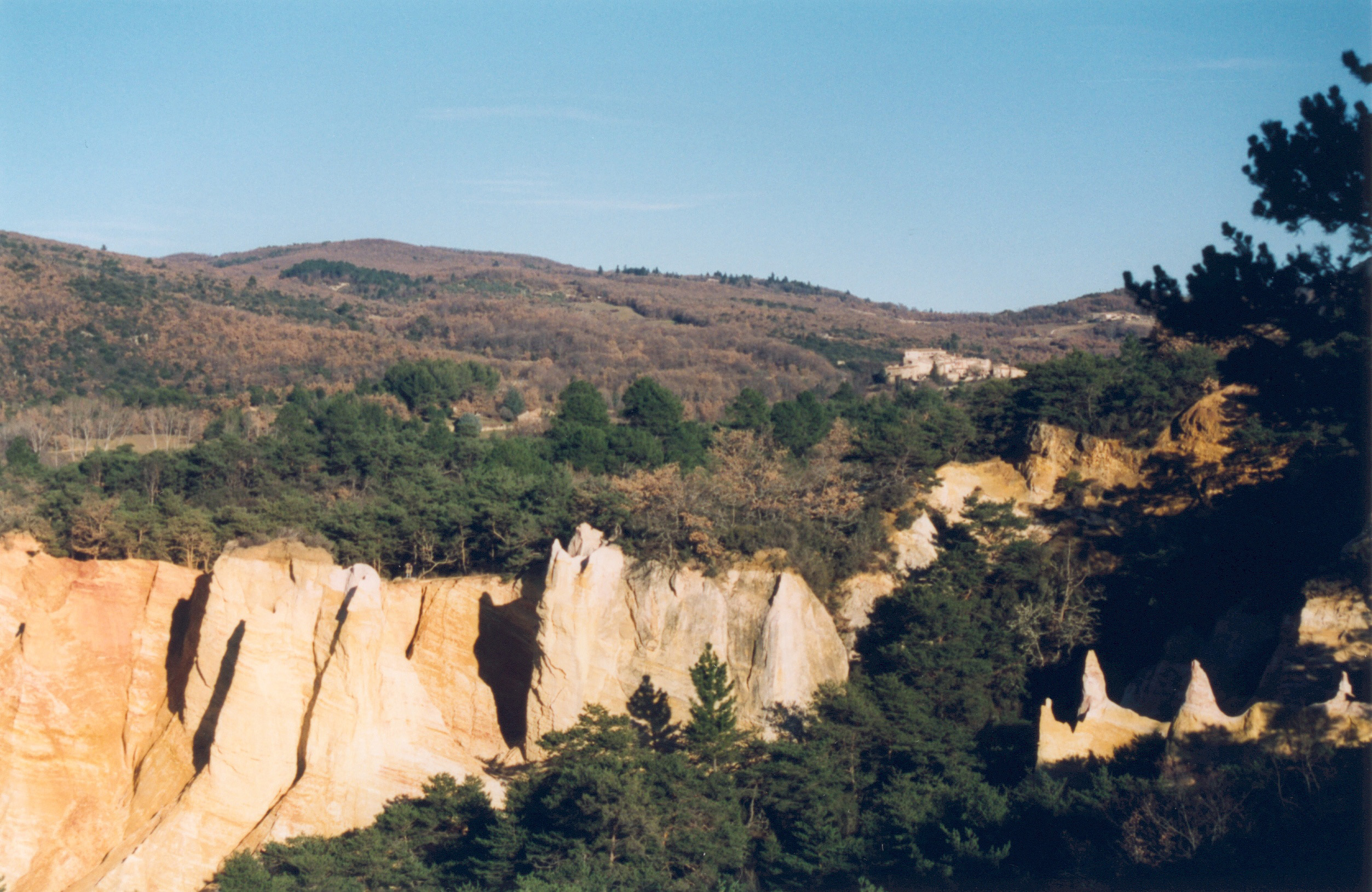 Rustrel Vaucluse France Carrière d'ocres Photographie prise par Patrik GIRAUD